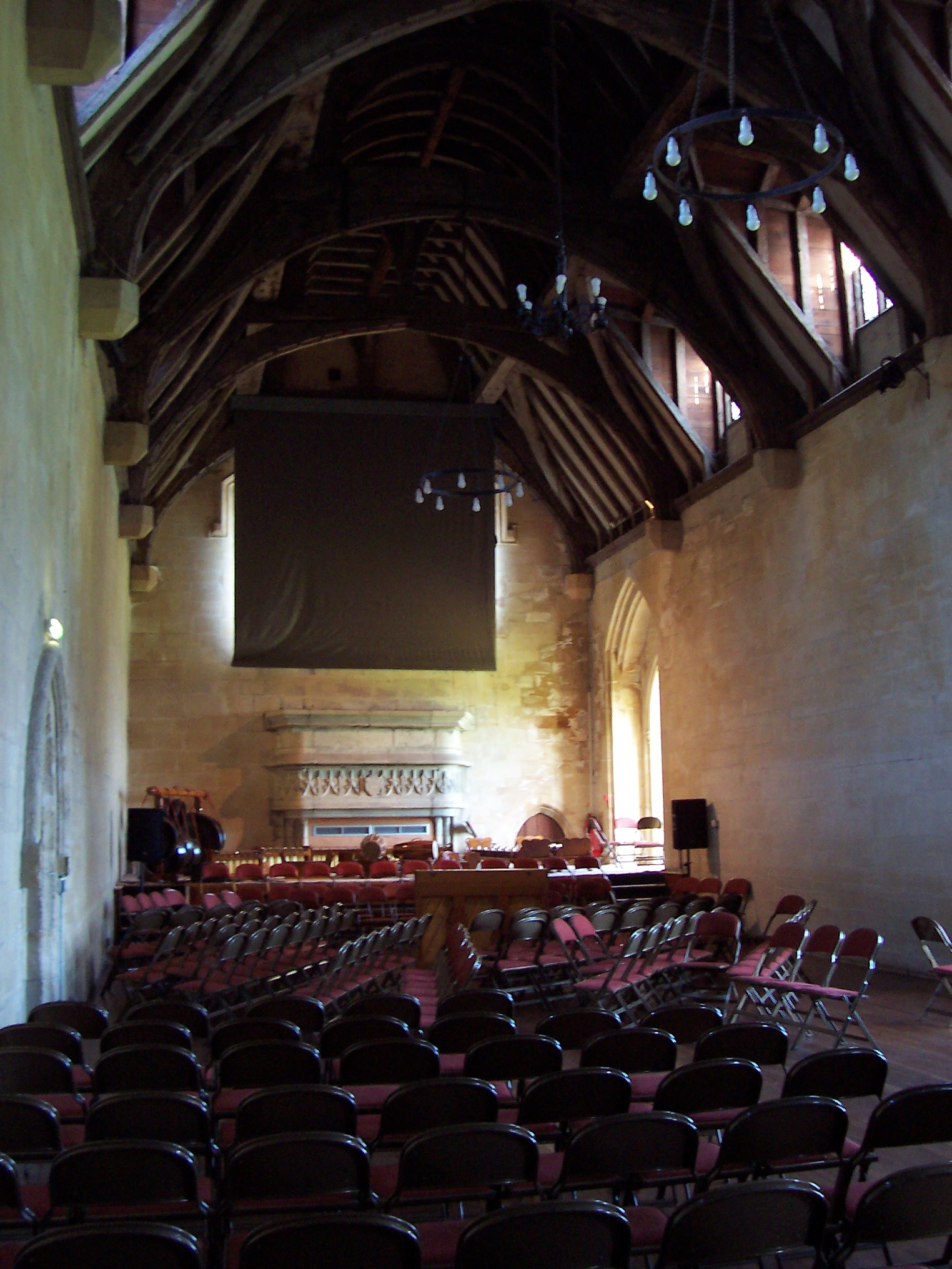 Bradenstoke Hall